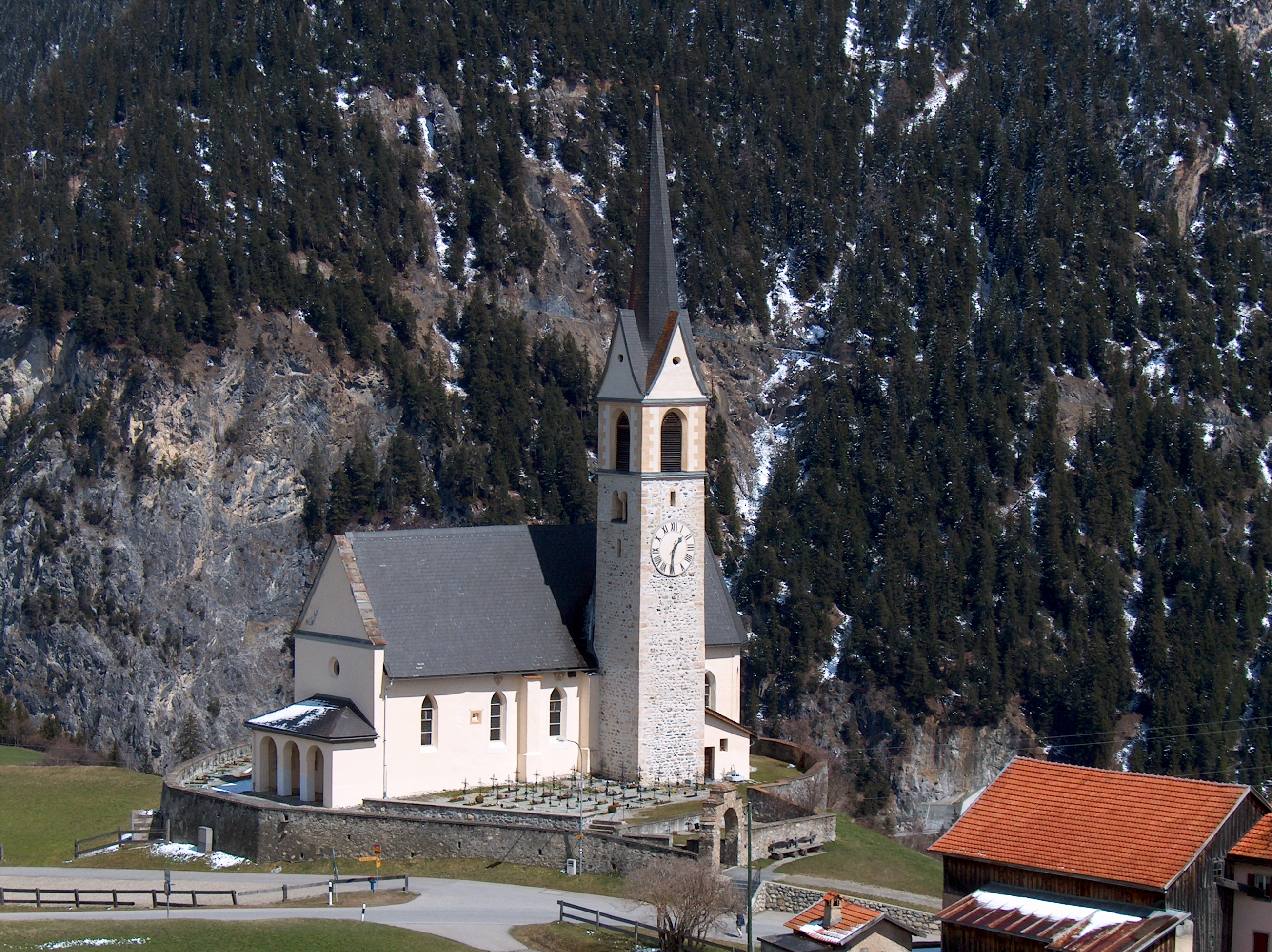 Salouf, Kirche St. Georg Rumantsch: Salouf, Baselgia Son Gieri